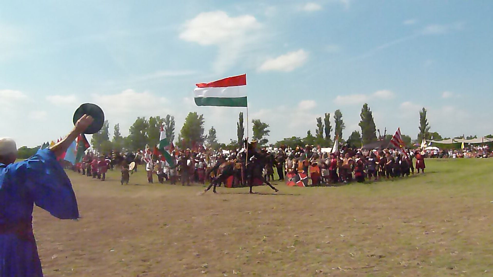 A felvétel 2014. augusztus 9-én, szombaton készült Bugacon. Kurultáj - Magyar Törzsi Gyűlés. 2006 szeptemberében Bíró András Zsolt antropológus, humánbiológus vezetésével öt fős kazak-magyar kutatócsoport több mint egy hónapos expedíció keretében járta be az észak-kazahsztáni Torgaj-vidék területét (Kosztunaj-tartomány, Dzsangeldi-megye), és a kutatás genetikai kapcsolatot mutatott ki a mai magyarság és az említett területen élő madjar törzs (ejtsd: magyar, más néven „torgaji magyarok”) között. Az eredményekről az American Journal of Physical Anthropology tudományos szakfolyóirat is beszámolt. 2006 decemberében a madjarok vezetői Bíró Andrást is meghívták első közös megbeszélésükre Kazahsztánba, ahol úgy döntöttek, hogy létrehoznak egy alapítványt és a következő évben összehívják a Kurultájt, a madjarok törzsi gyűlését. Címkék: Eurasian puszta Puszta Puszta öv Puszta belt Bíró András Zsolt Torgaj Dzsangeli megye Kurultáj Magyar Törzsi Gyűlés 2014-08-09 Magyarok Világszövetsége Magyar-Turán Alapítvány Turán népei Lezsák Sándor (2010: Bugac), (2014: Bugac) Források: Nagy-Kurultáj ©© Derzsi Elekes Andor, Budapest, 2014, You are authorised to use these photos and vids under Creative Commons – even for commercial, for profit purposes. Photos must be attributed to Derzsi Elekes Andor. All of the photos and vids in the Metapolisz DVD line are under Creative Commons and can be used even for commercial – for profit – purposes. Recommended Citation Derzsi Elekes Andor: Metapolisz DVD line